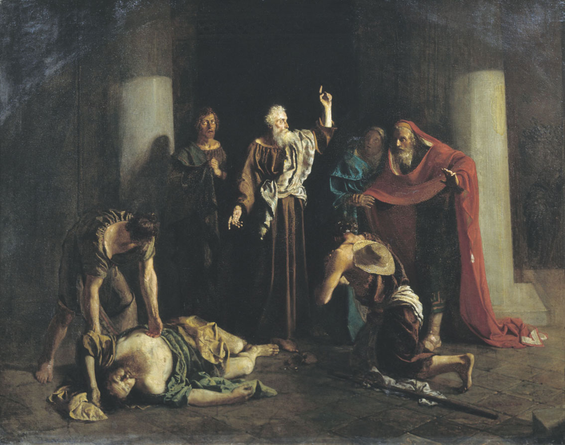 Картина "Апостол Петр поражает смертью Ананию и жену его Сапфиру за ложь" - художник Михаил Михайлович Зеленский (1843 — после 1882)